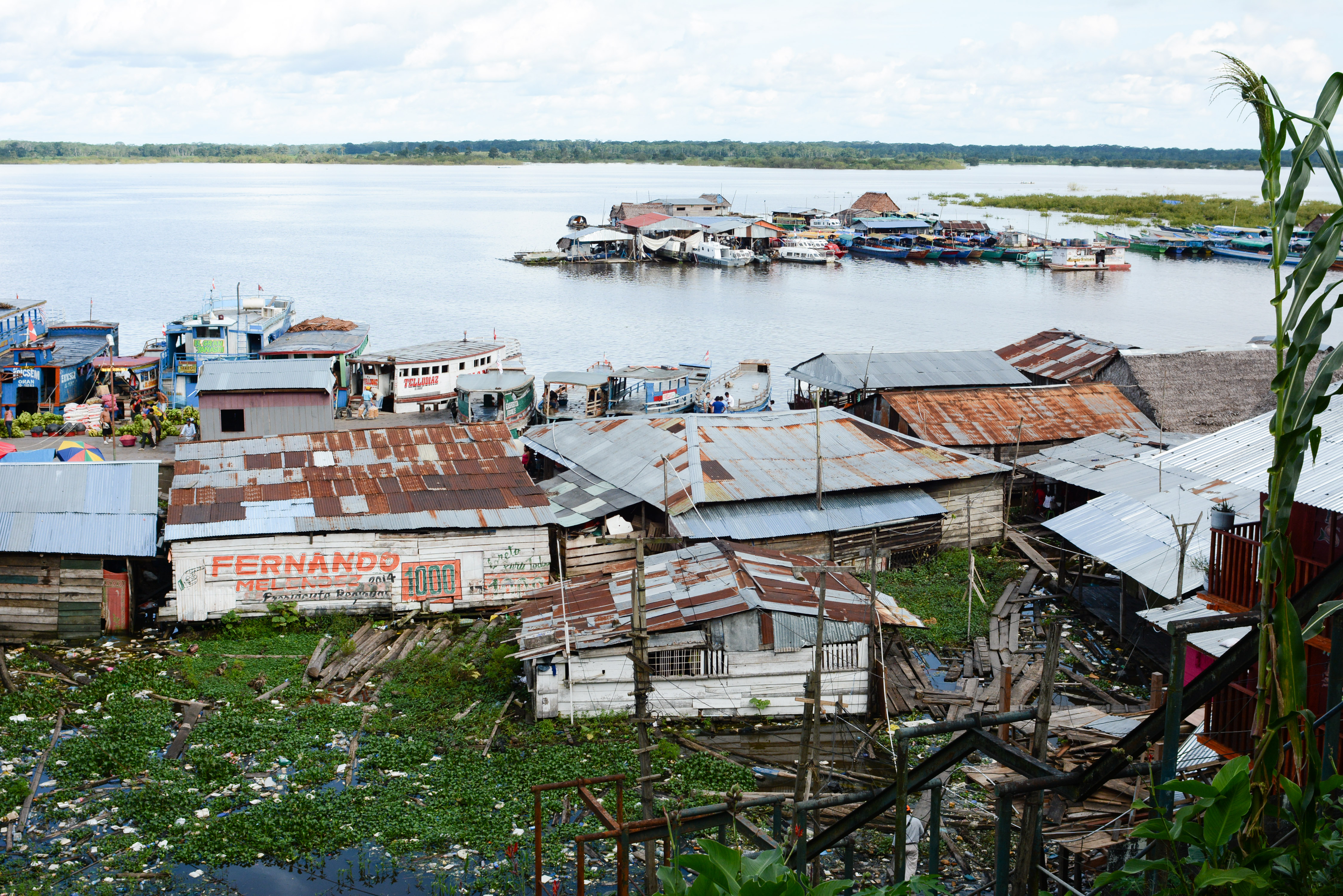 Iquitos, Peru